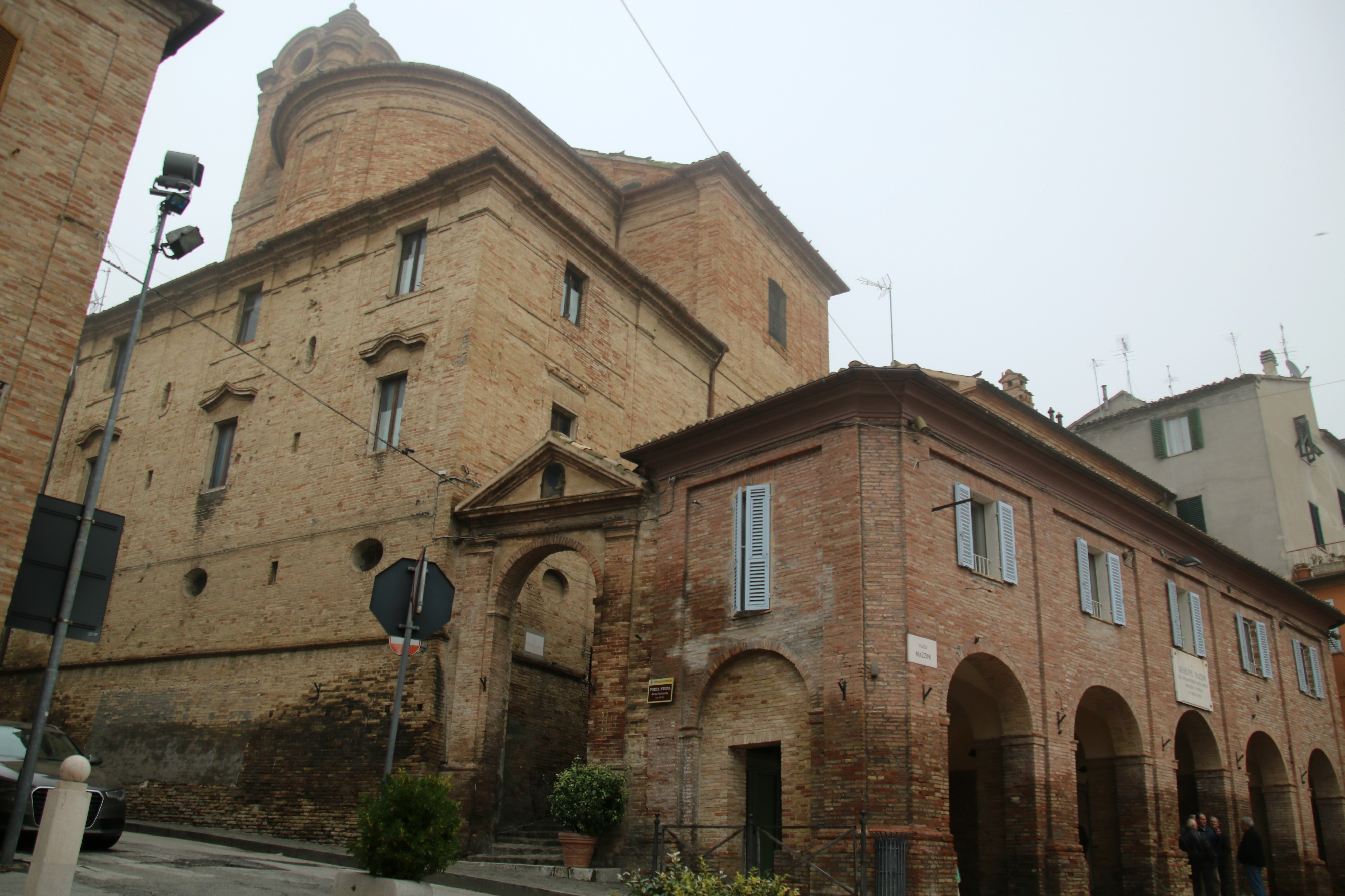 Piazza Mazzini (Filottrano)